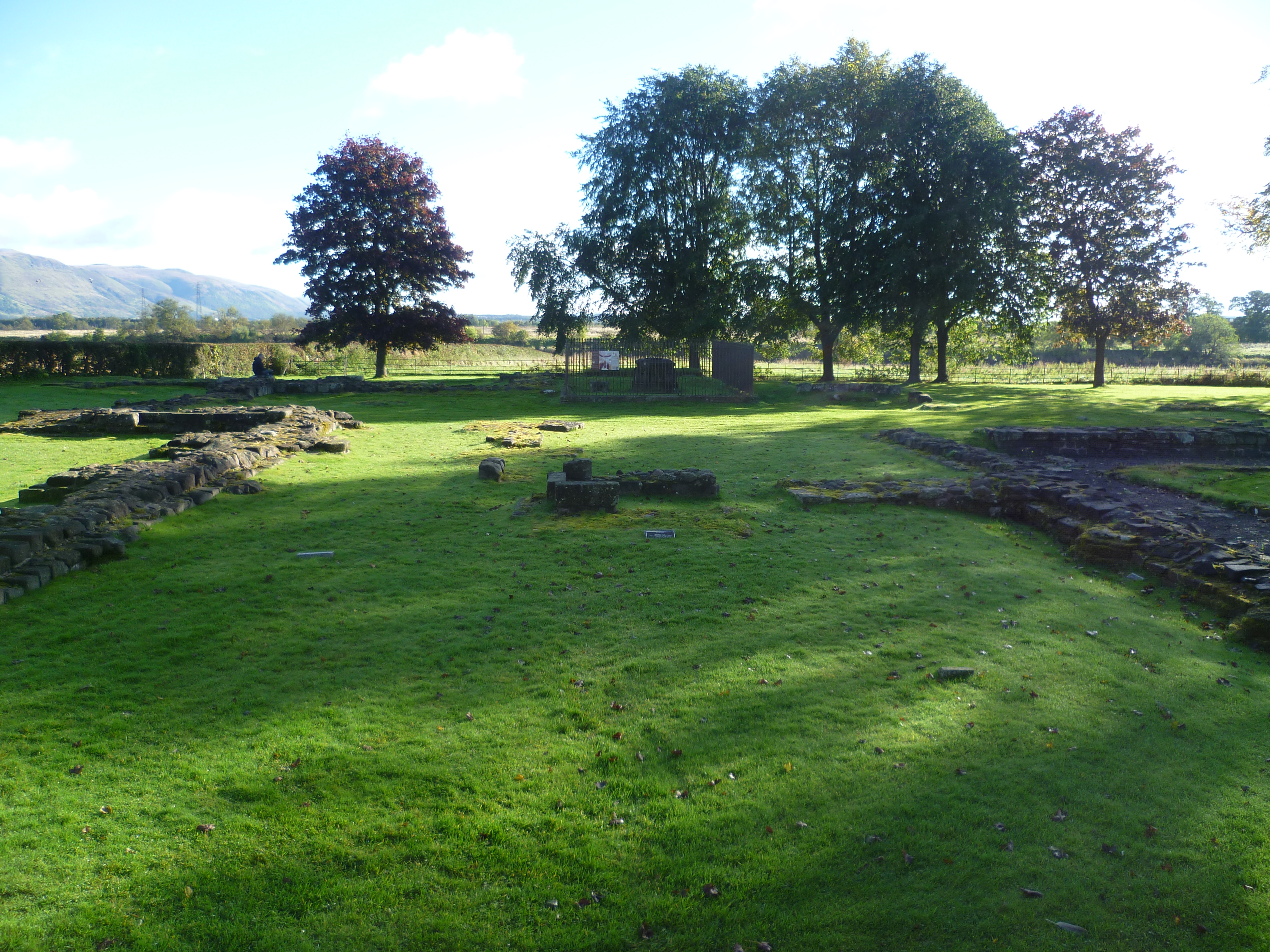 Cambuskenneth Abbey, Blick nach Westen in die Ruinen des Kirchenschiffs